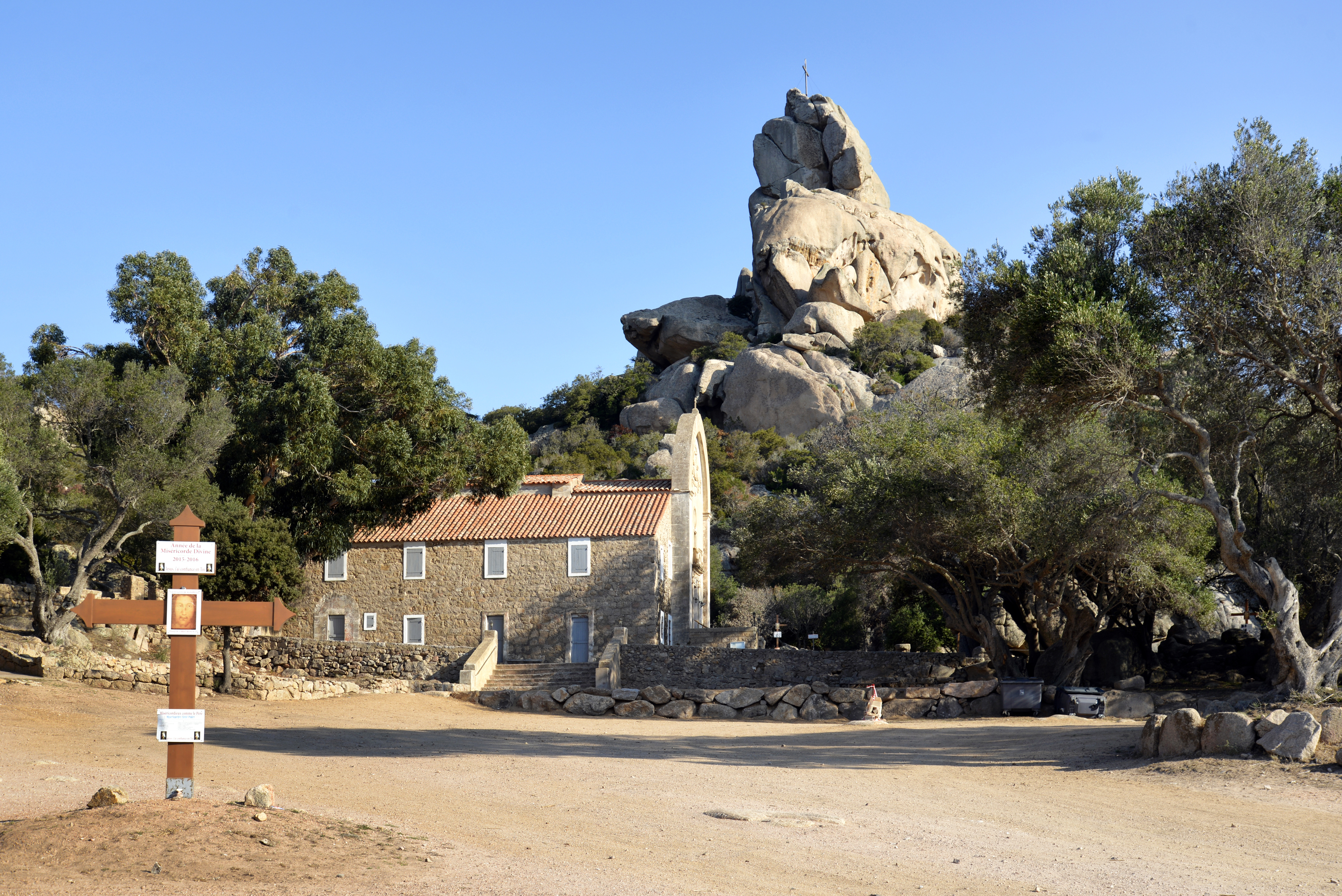 Bonifacio, Freto (Corse-du-Sud) - Le site de la Trinité, avec l'église de la Très Sainte Trinité dite « l'Ermitage ».Trois pèlerinages s'y déroulent chaque année : celui dédié à la Très-Sainte-Trinité en juin, celui consacré à la Nativité de Marie le 8 septembre, et enfin le plus récent, celui Notre-Dame de Fatima destiné à la communauté portugaise de la région. Caché par l'édifice, se trouve l'oratoire Notre-Dame de Tibhirine.